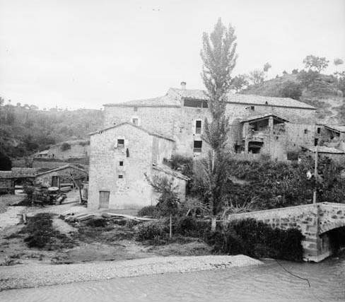 Imatge